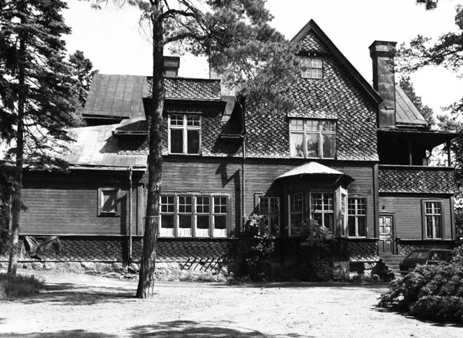 Bogemanska villan, Ringvägen 74, numera riven